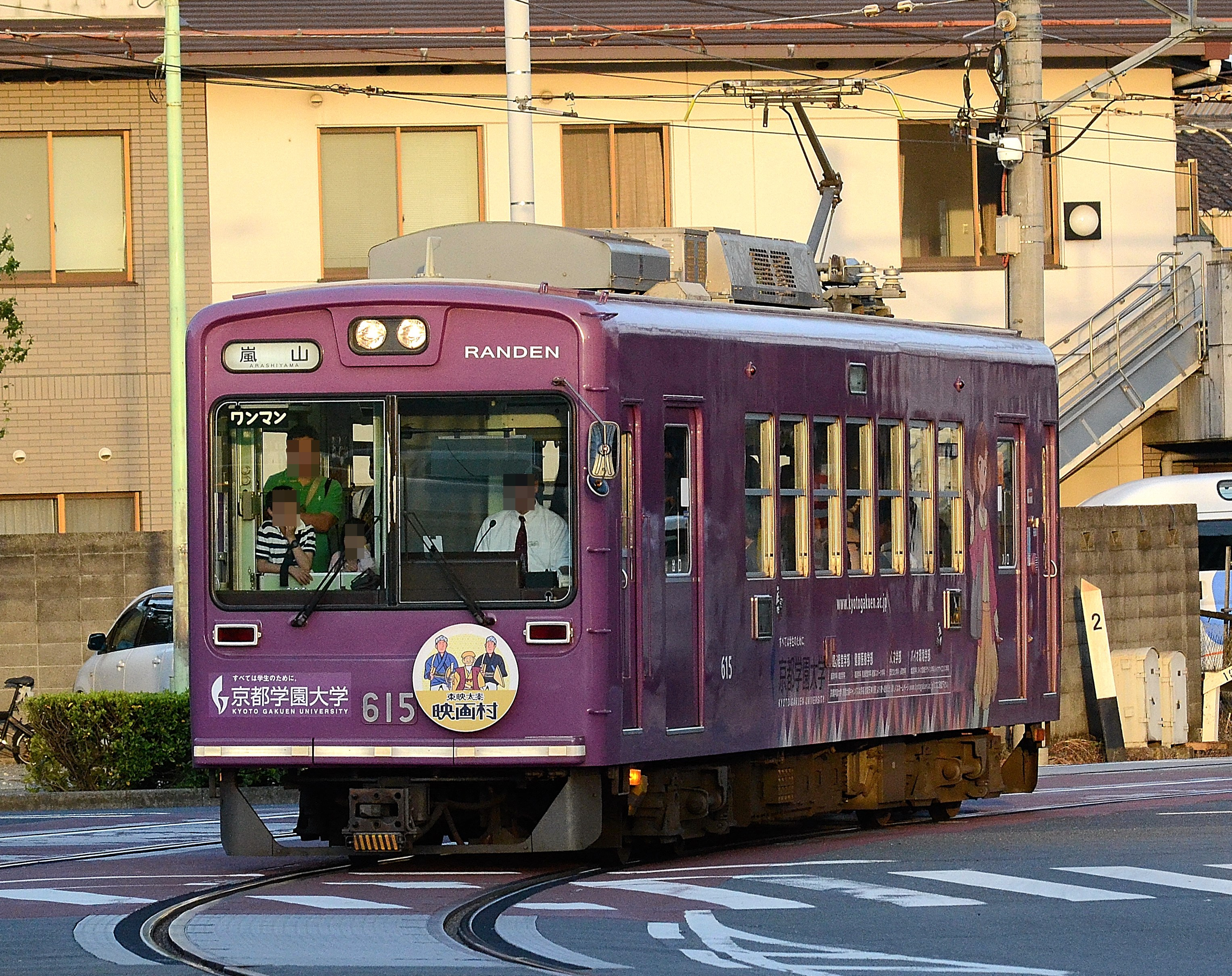 京福電気鉄道のモボ615